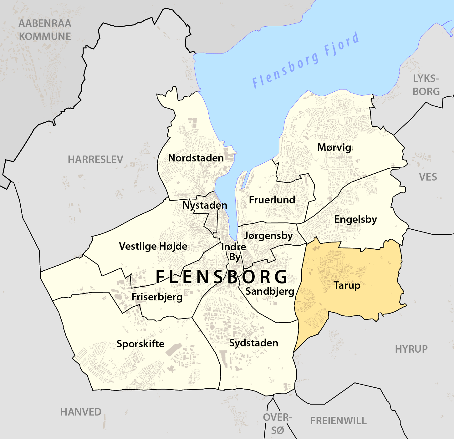 Beliggendhed af Tarup i Flensborg Kommune